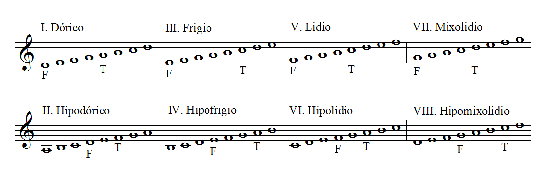 Modos medievales, eclesiásticos o gregorianos